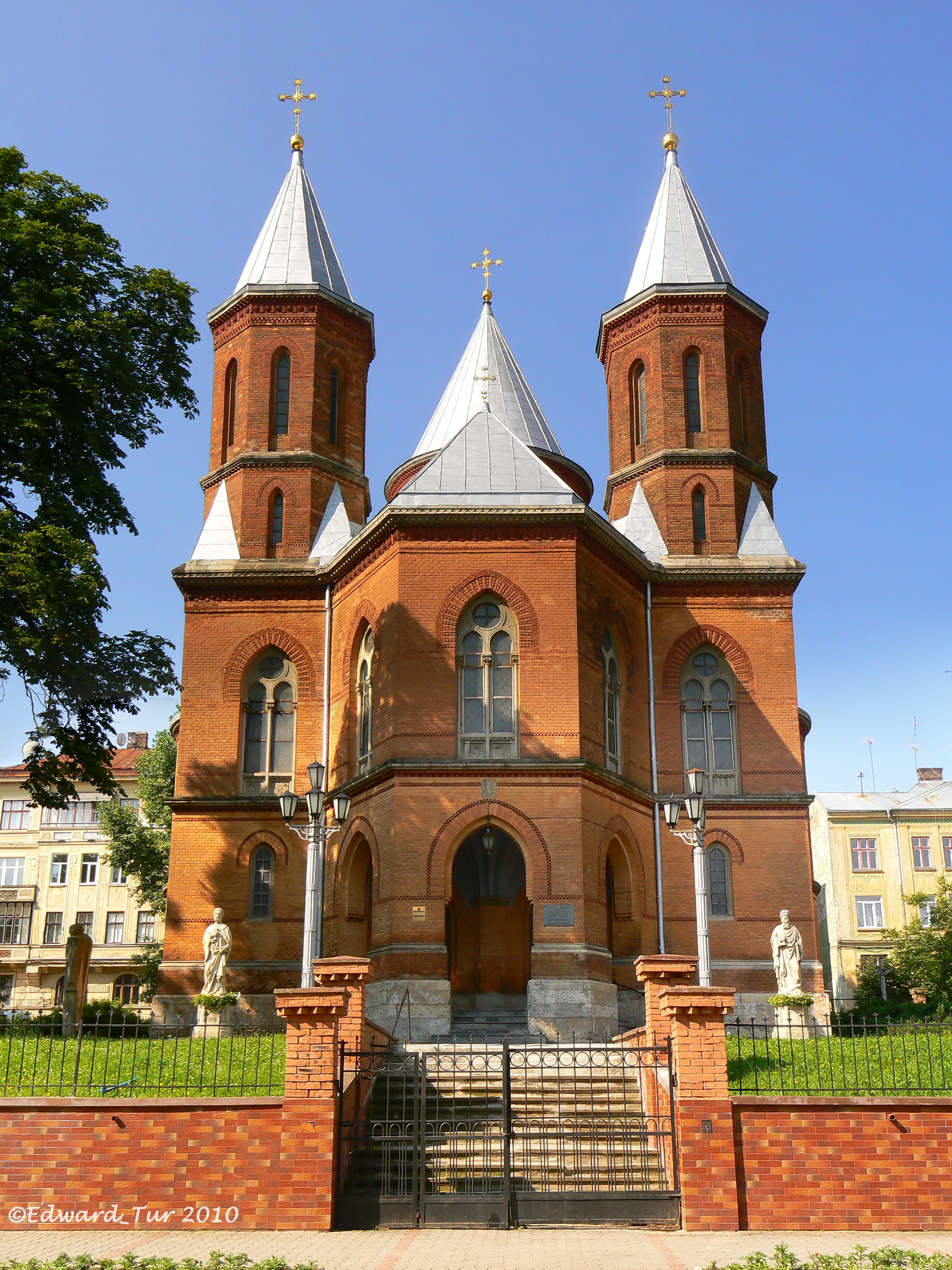 Вірменська церква в Чернівцях